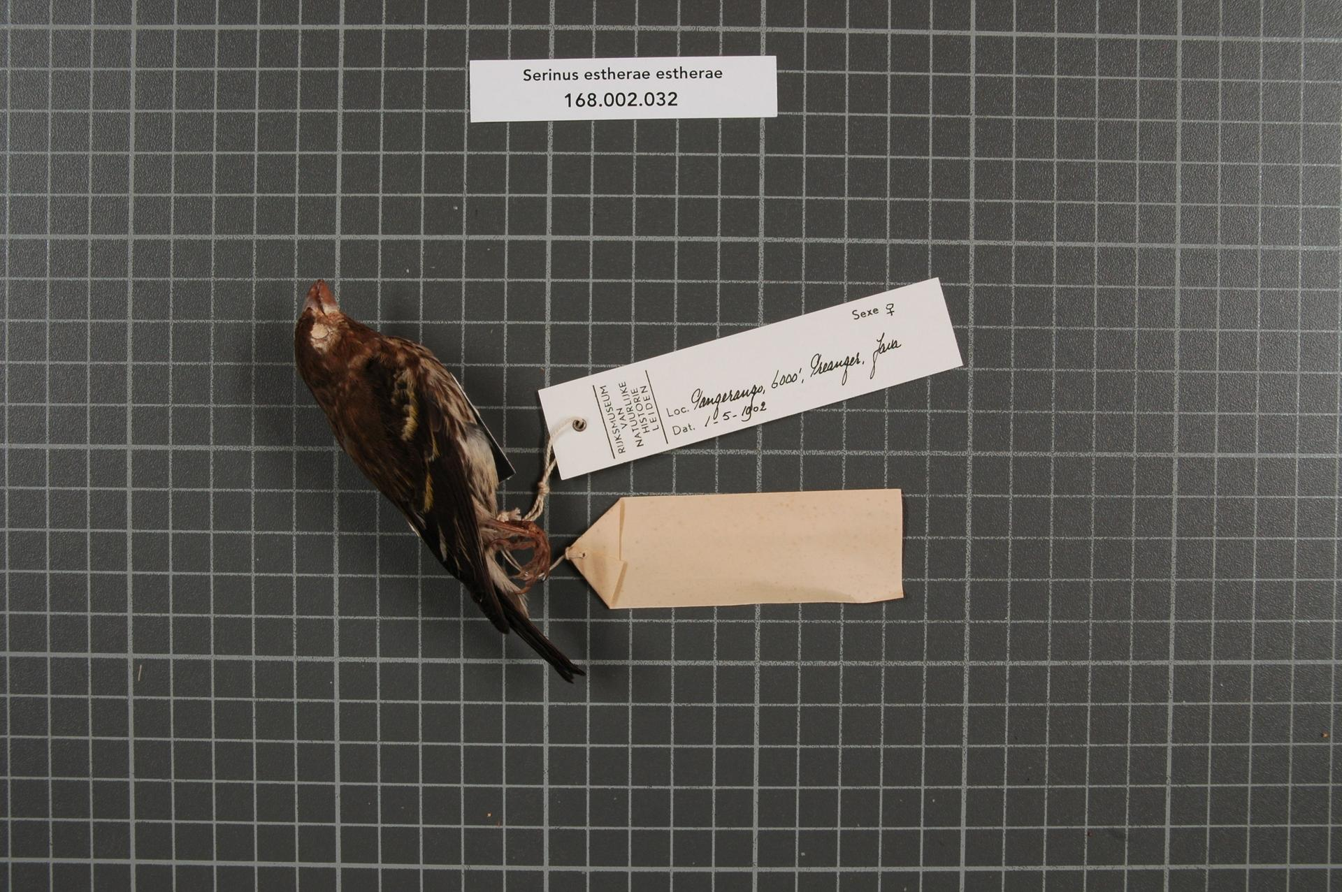 Serinus estherae estherae (Finsch, 1902)